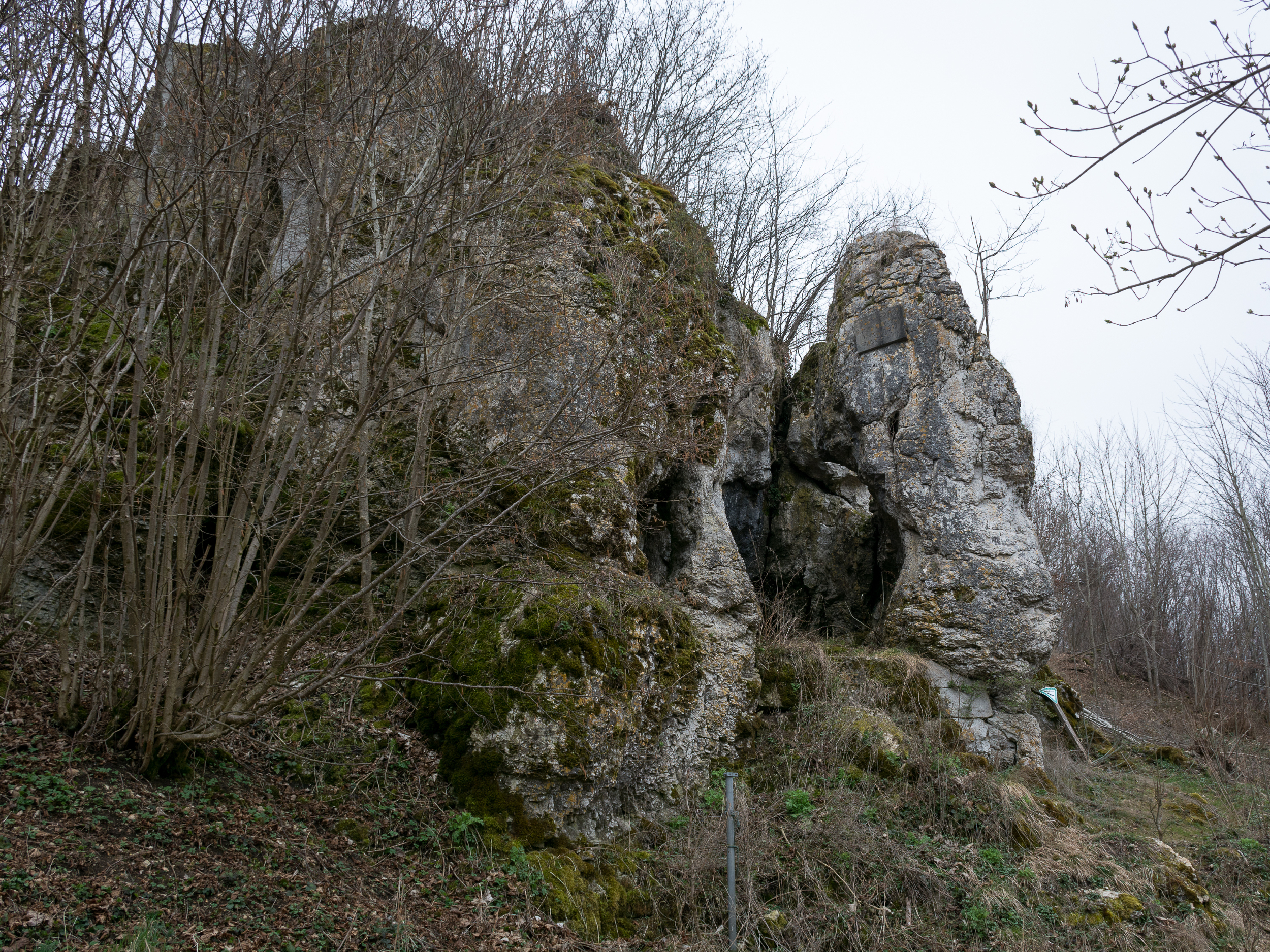 Die Haldensteinhöhle am Ortsrand von Lonsee-Urspring.